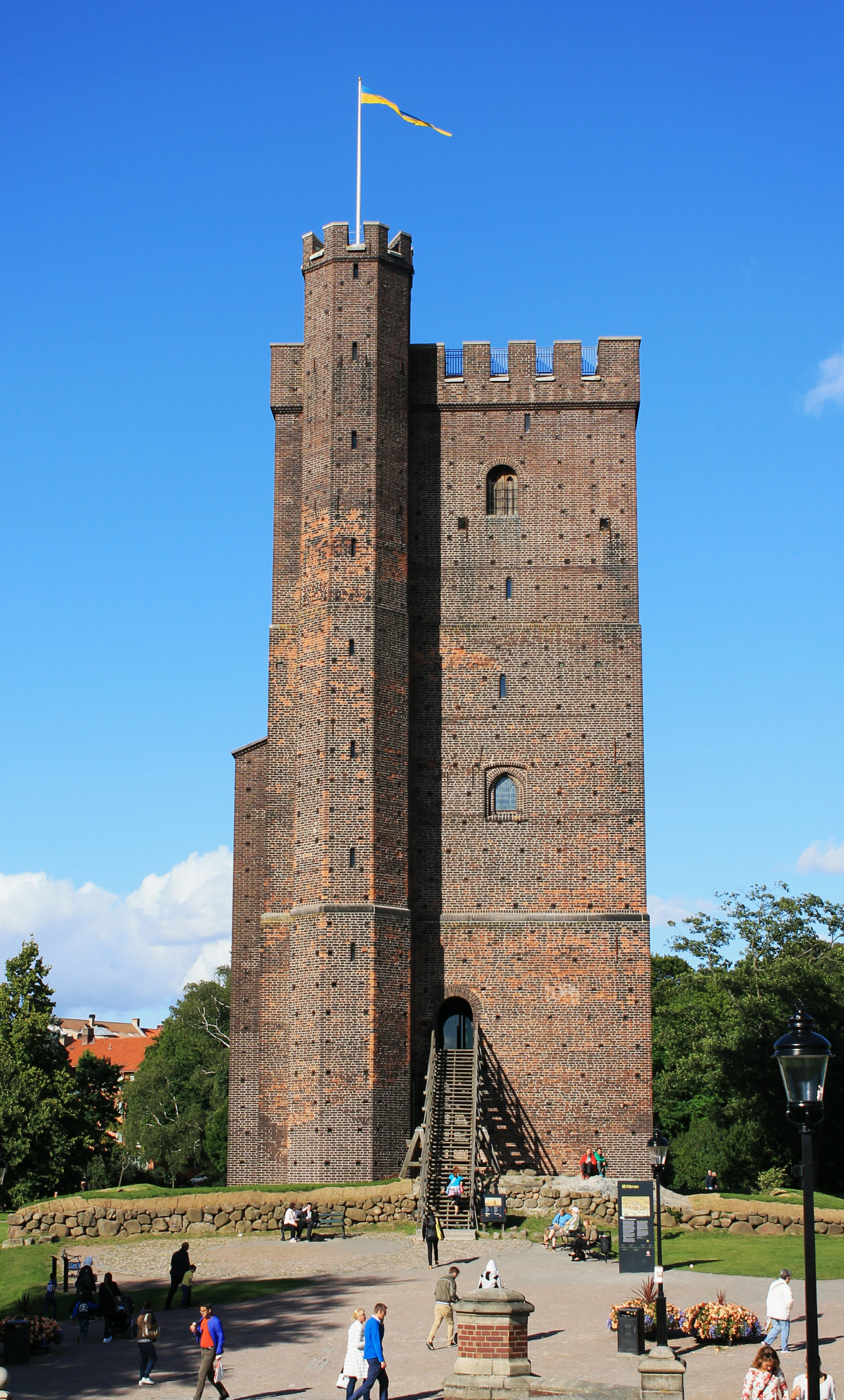 Kärnan (Gamla Staden 8:2)